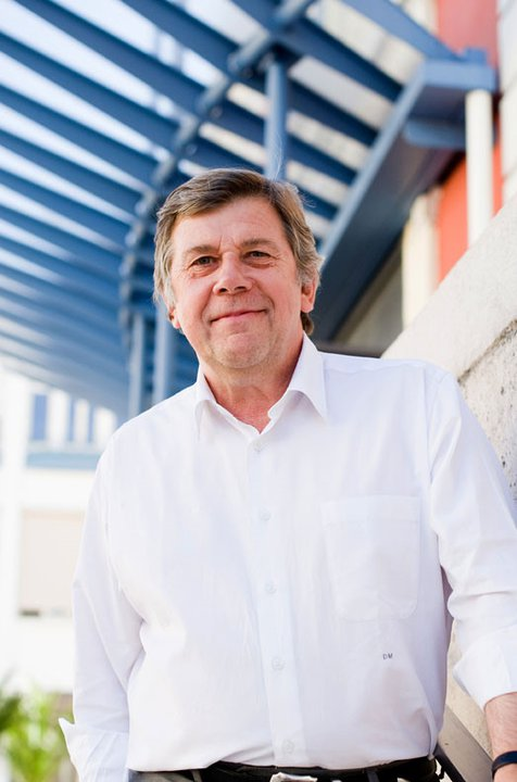 Didier Mathus